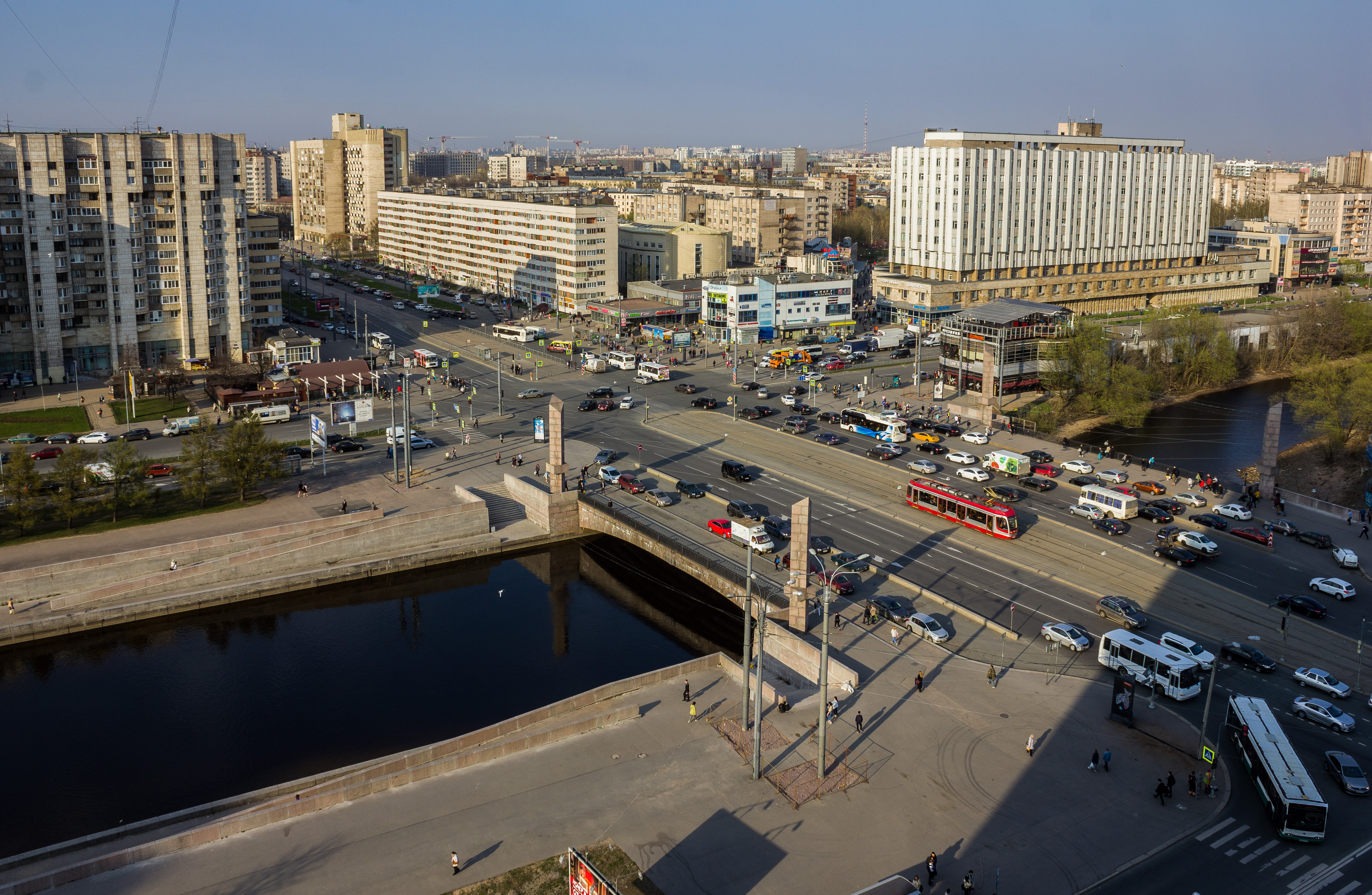 Санкт-Петербург. Наличный мост через реку Смоленку